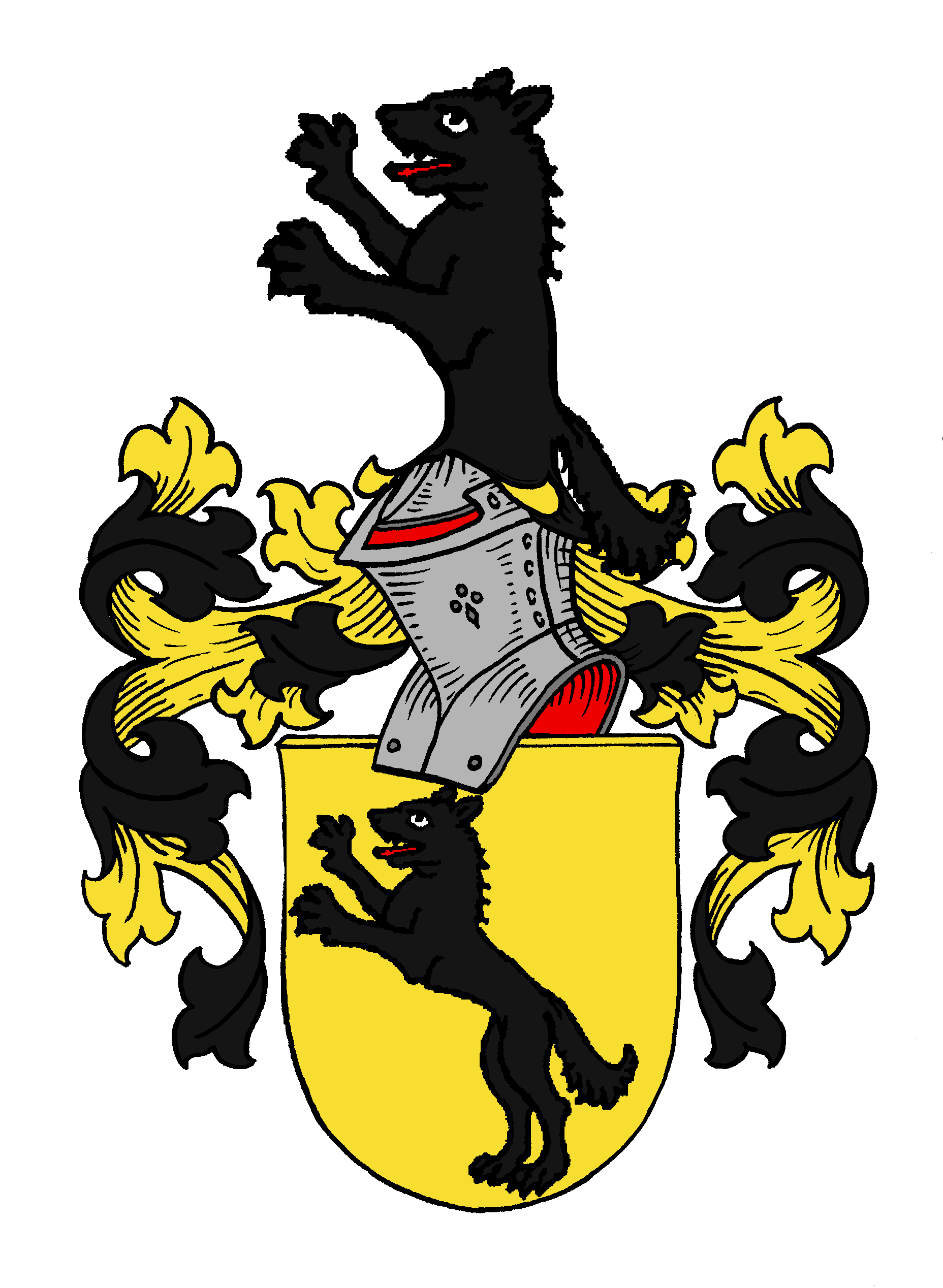 Wappen der Wolff von Todenwarth, altes hennebergisch-hessisches Geschlecht mit dem Stammsitz Zollburg Todenwarth (zu der Warth) bei Schmalkalden